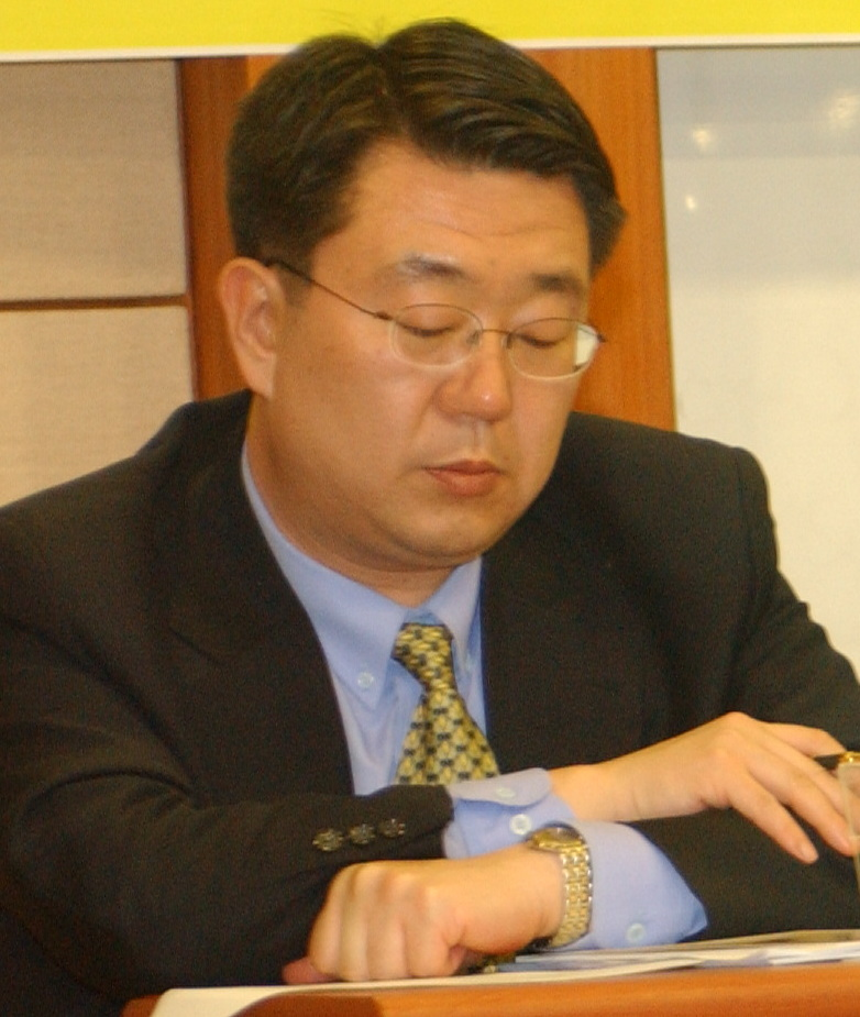 강제상, 2003년 4월 한국행정학회 세미나 '재난관련 조직개편 어떻게 할 것인가?'